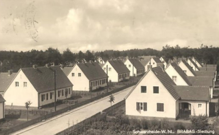 Postkarte Siedlung Schwarzheide 1941